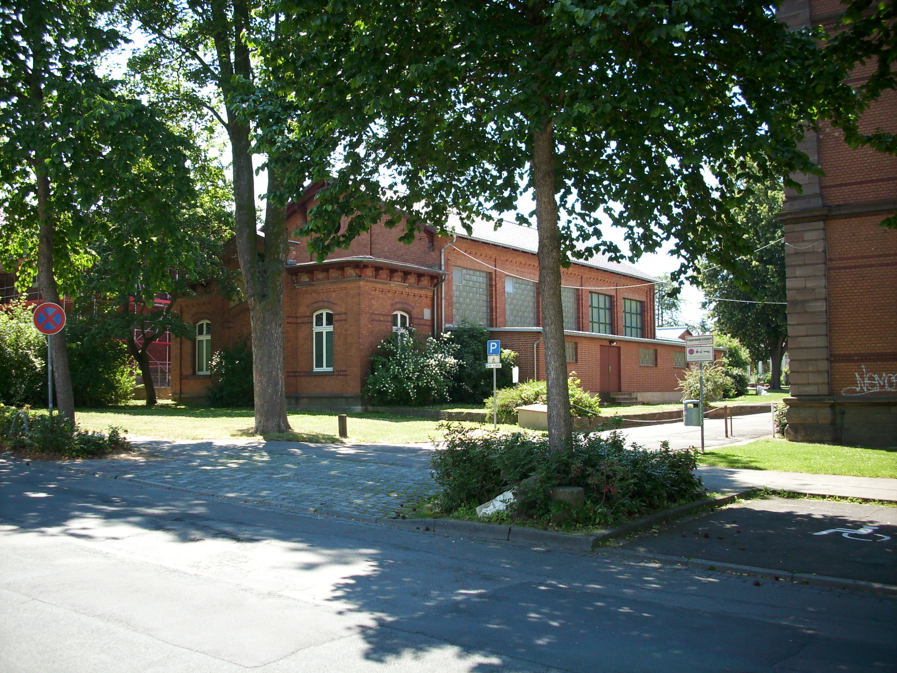 Die alte Turnhalle (um 1920 erbaut) des Gymnasium Corvinianum in Northeim. Sie wurde 2011 abgerissen.